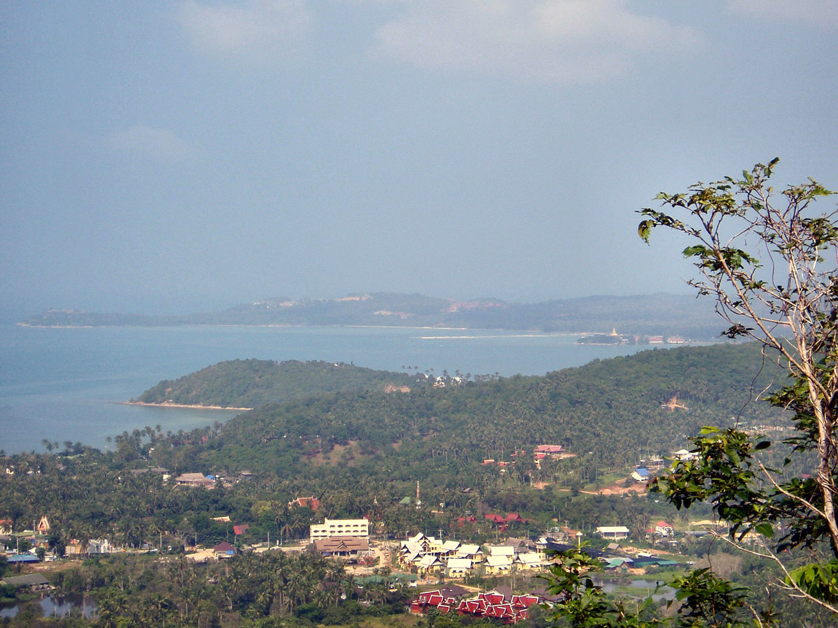 Foto van resortontwikkeling en villabouw in het heuvelland ten zuiden van Maenam op Koh Samui.